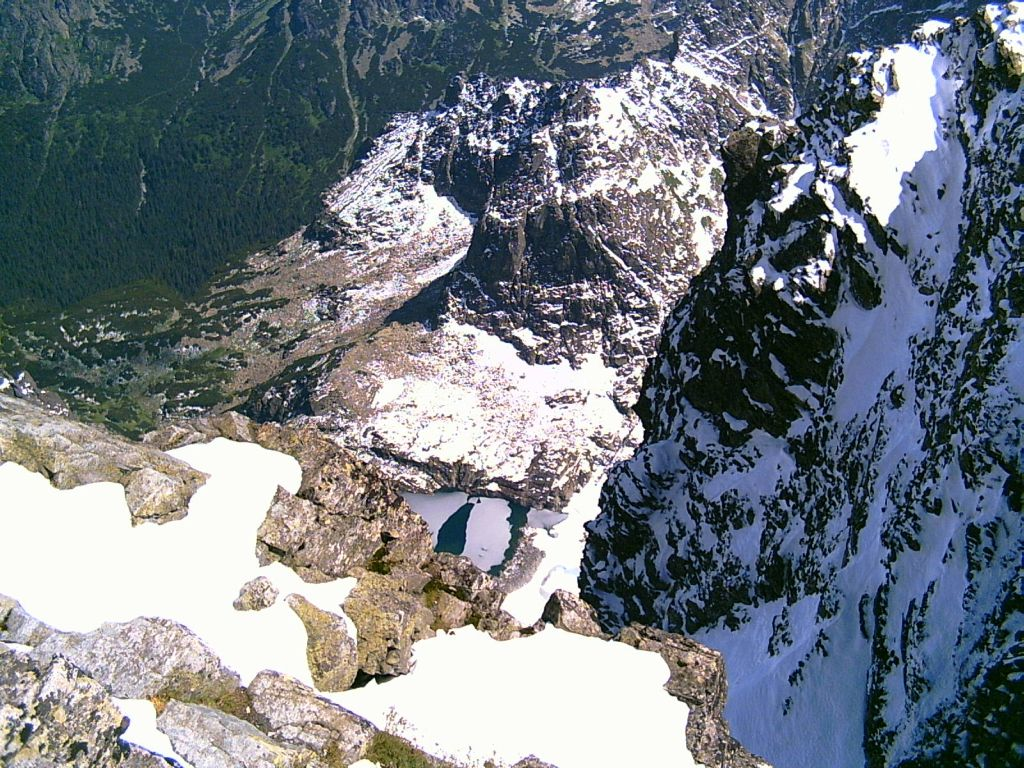 Zmarzly Staw z Rysów